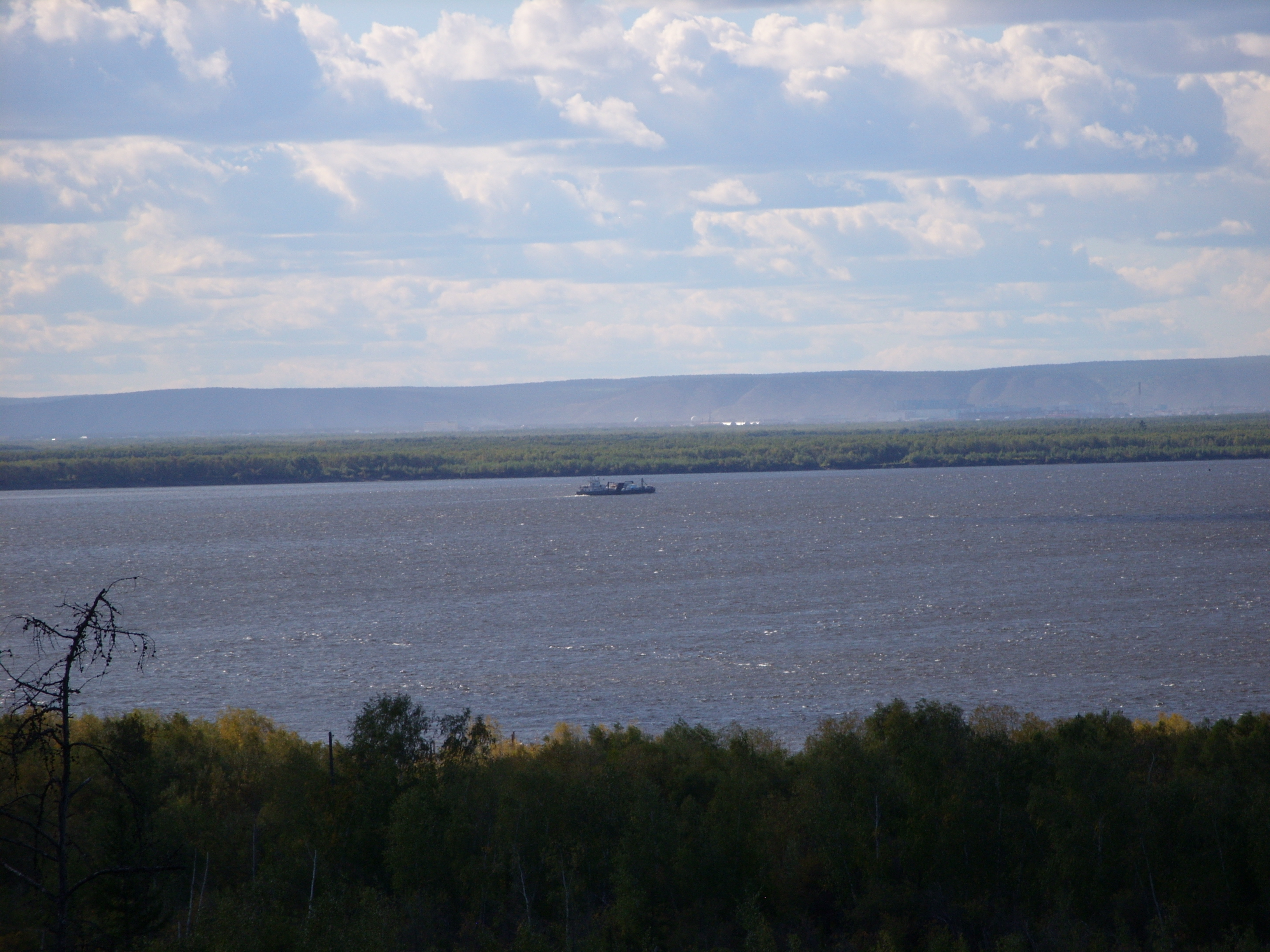 Снимок сделан в Нижнем Бестяхе, в районе нефтебазы, с высокого коренного берега Лены, с оптическим зумом 5х, в сентябре 2011 г.